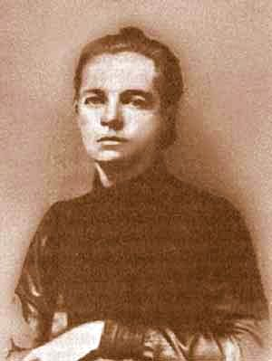 Русская революционерка, общественный и политический деятель Екатерина Дмитриевна Кускова (1869-1958)